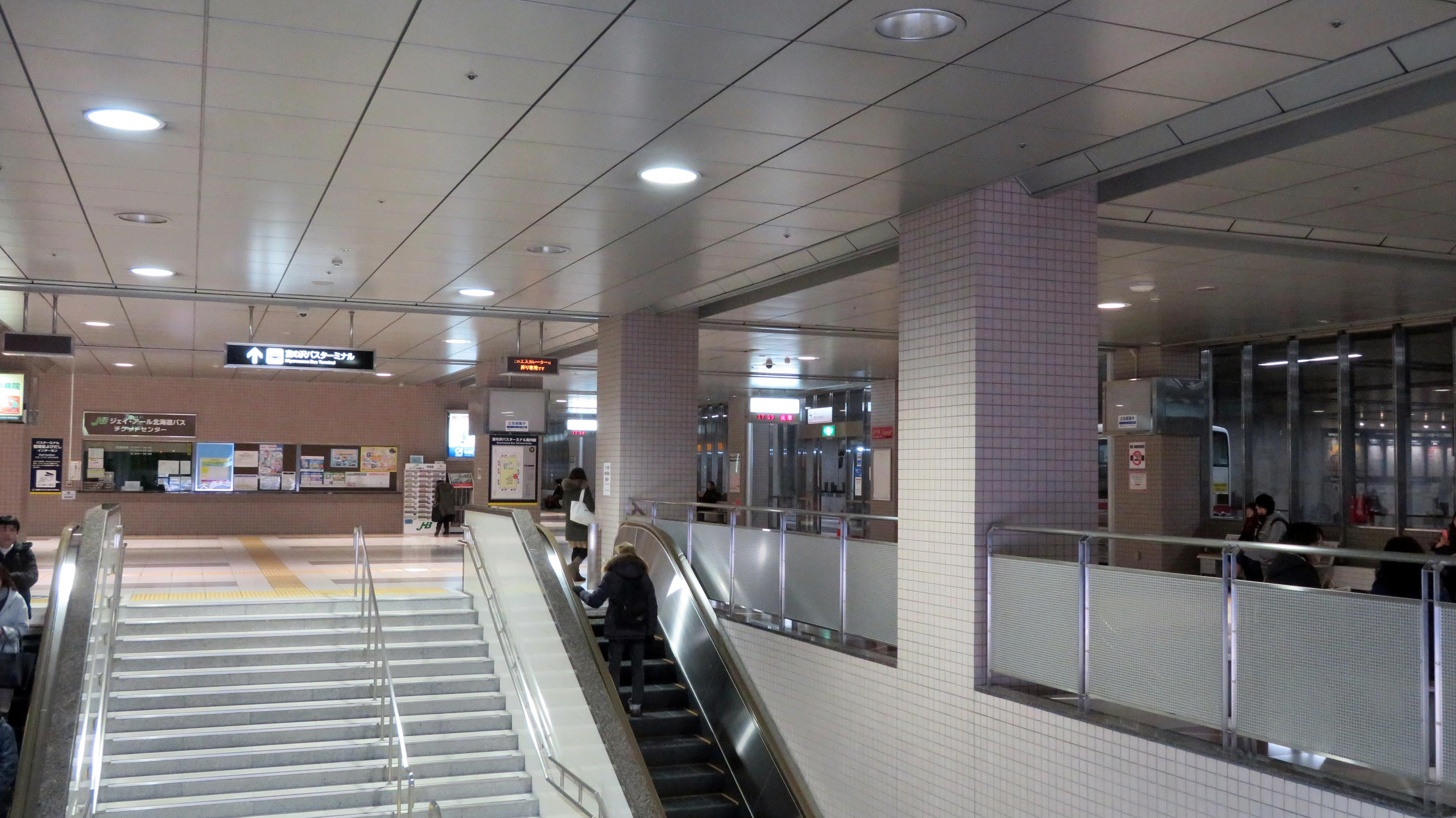 宮の沢バスターミナル Canon PowerShot SX720 HS